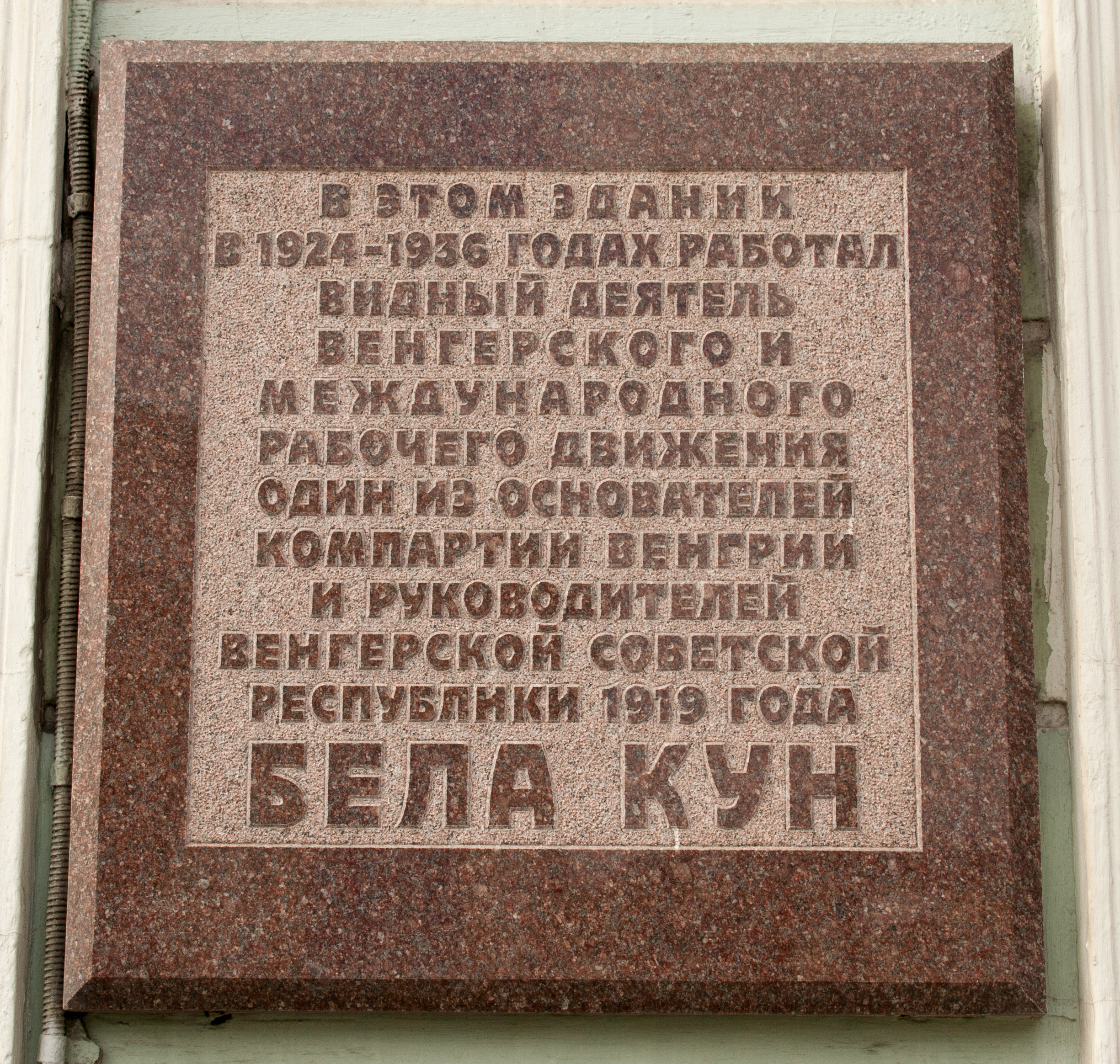 Plaque to Béla Kun in Moscowlabel QS:Len,"Plaque to Béla Kun in Moscow"label QS:Lhu,"Kun Béla emléktábla Moszkvában"